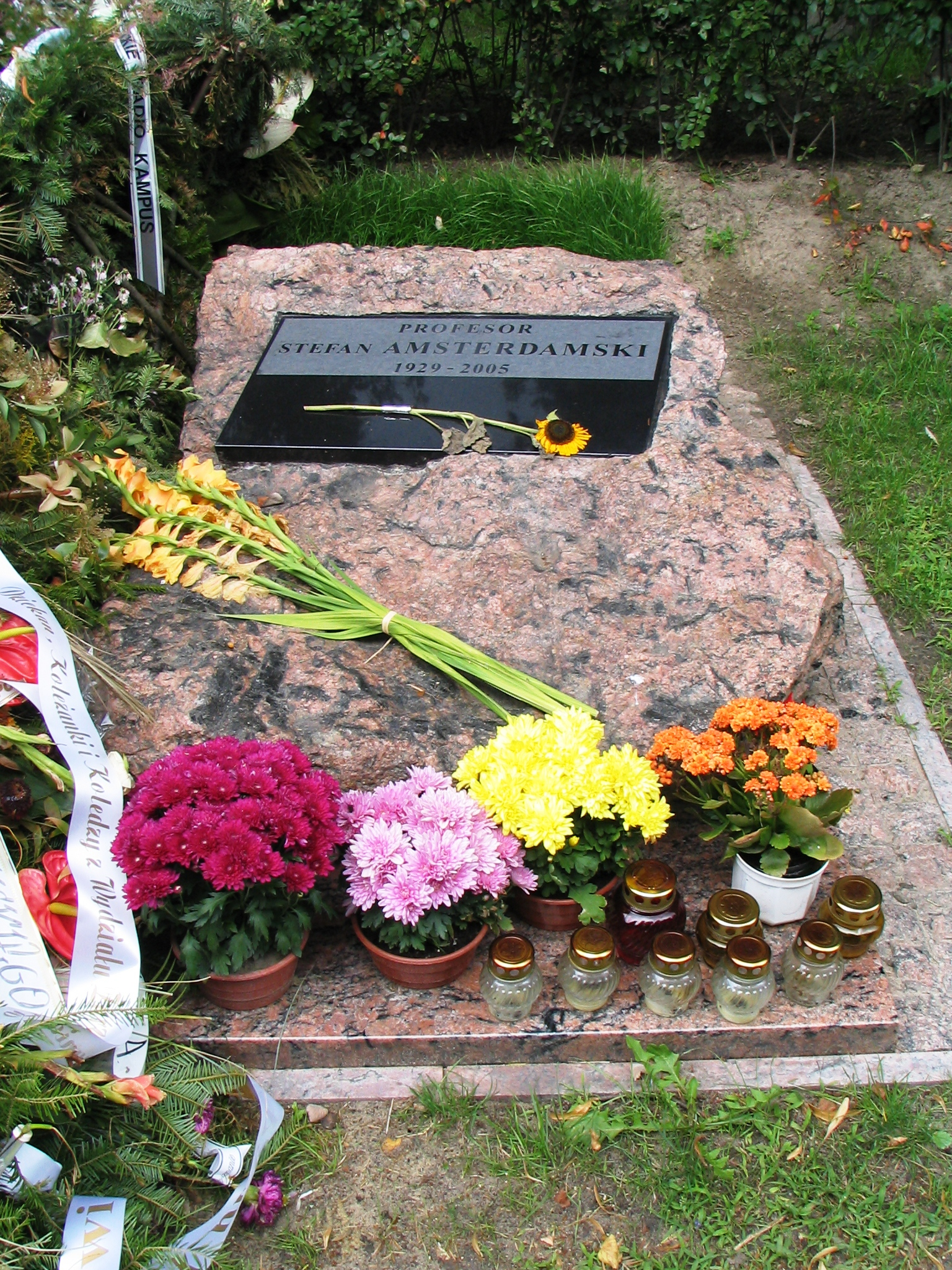 Grób prof. Stefana Amsterdamskiego